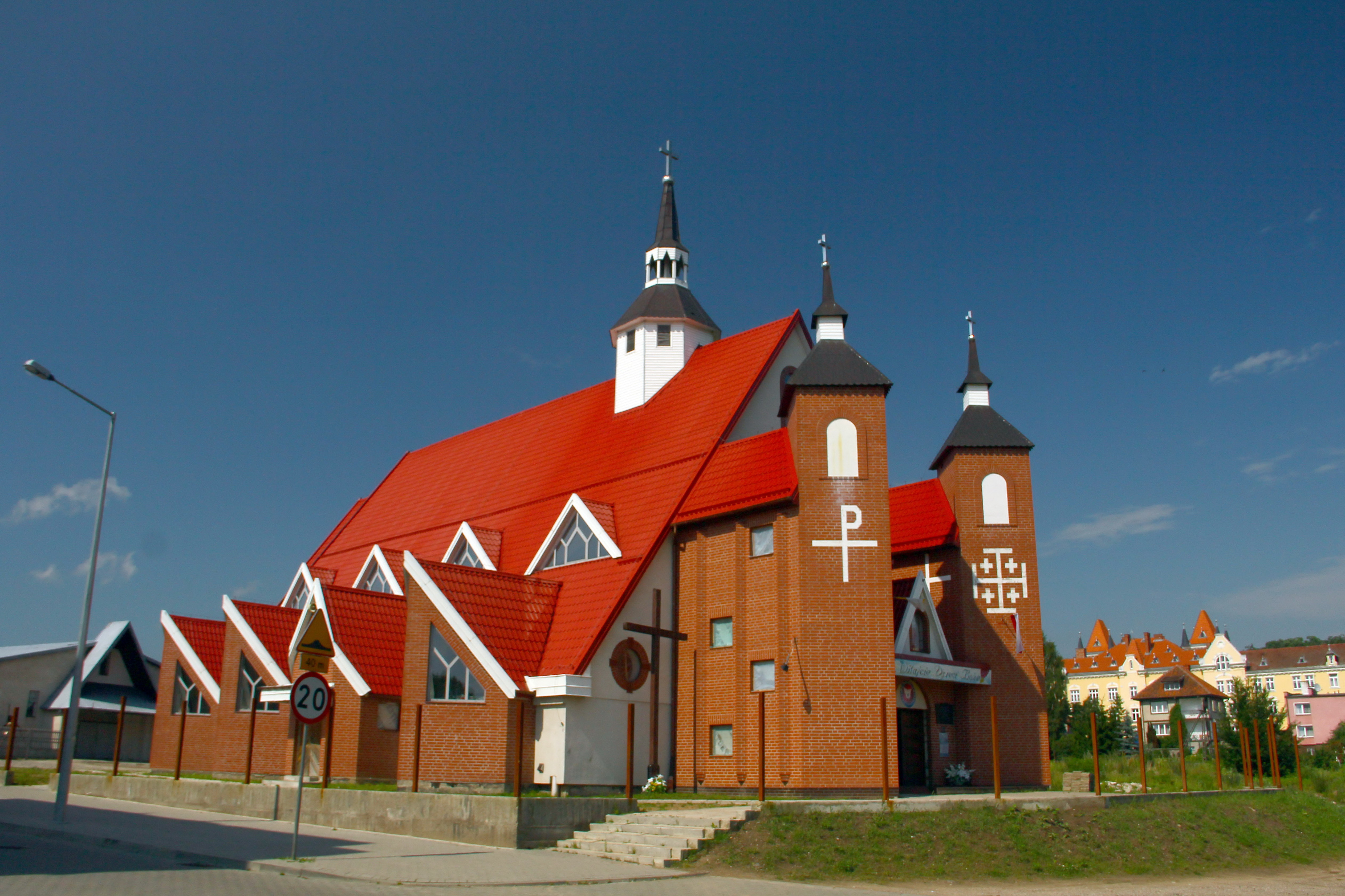 Kościół św. Brata Alberta w Bartoszycach.